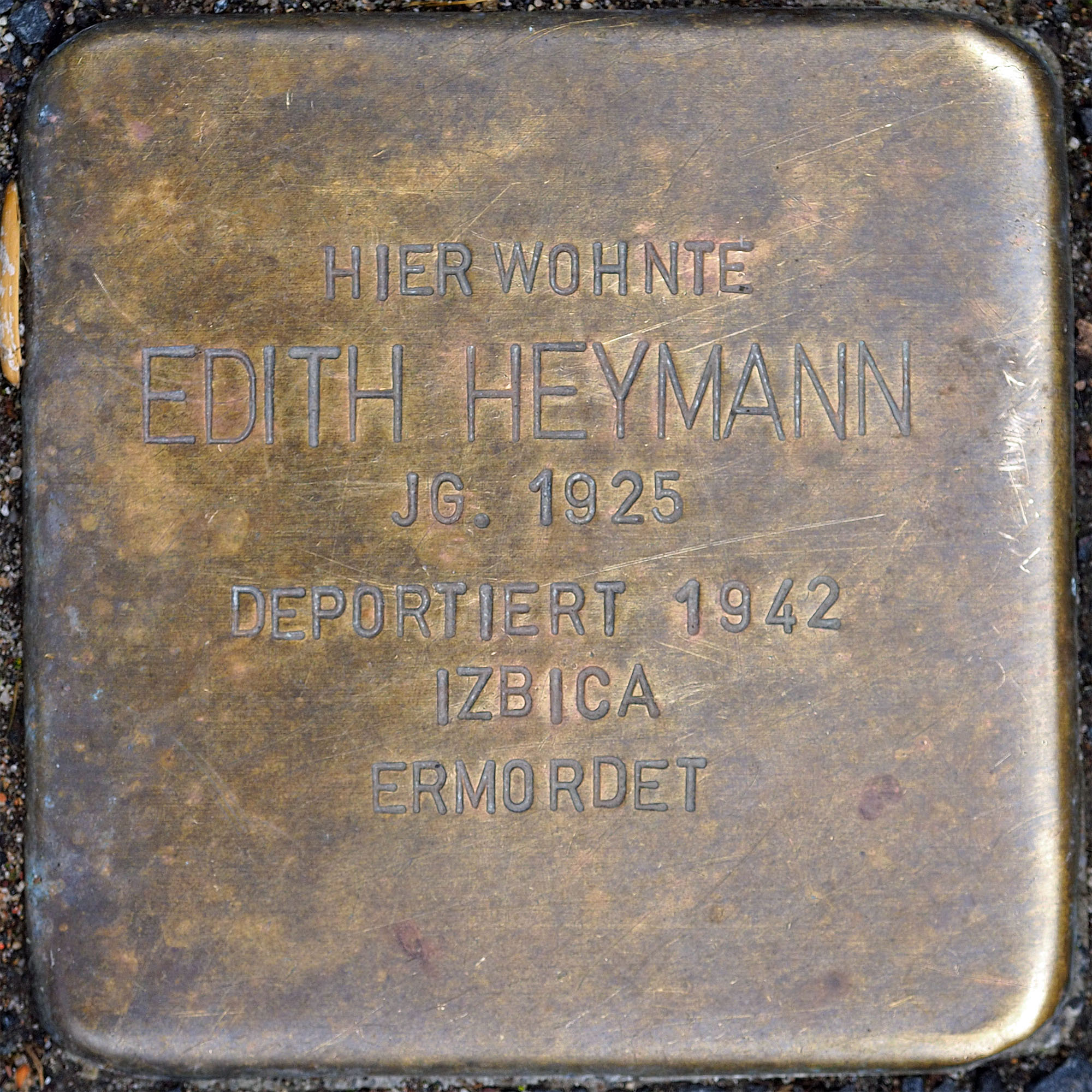 Stolpersteine MG: Heymann, Edith